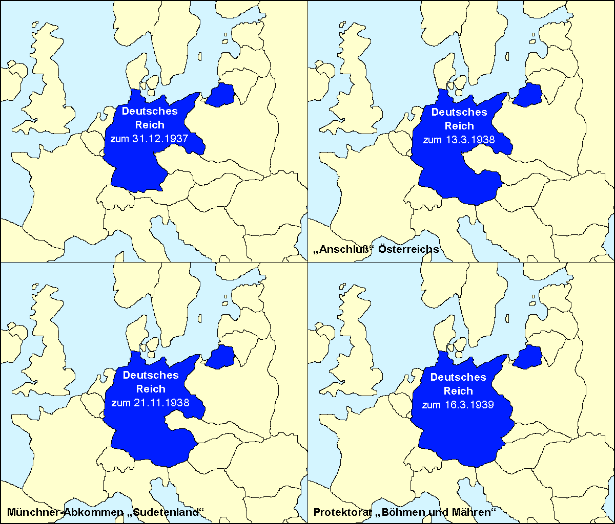 Deutsches Reich von 1937-1939